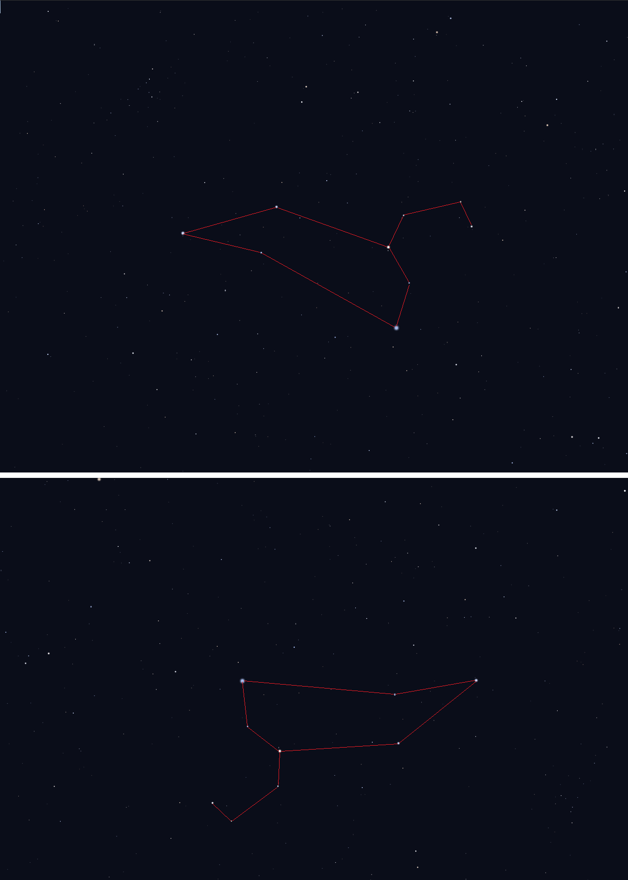 La constelación de Leo vista desde el hemisferio norte (arriba) y sur (abajo).